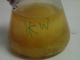 Hasil praktikum selulosa bakteri